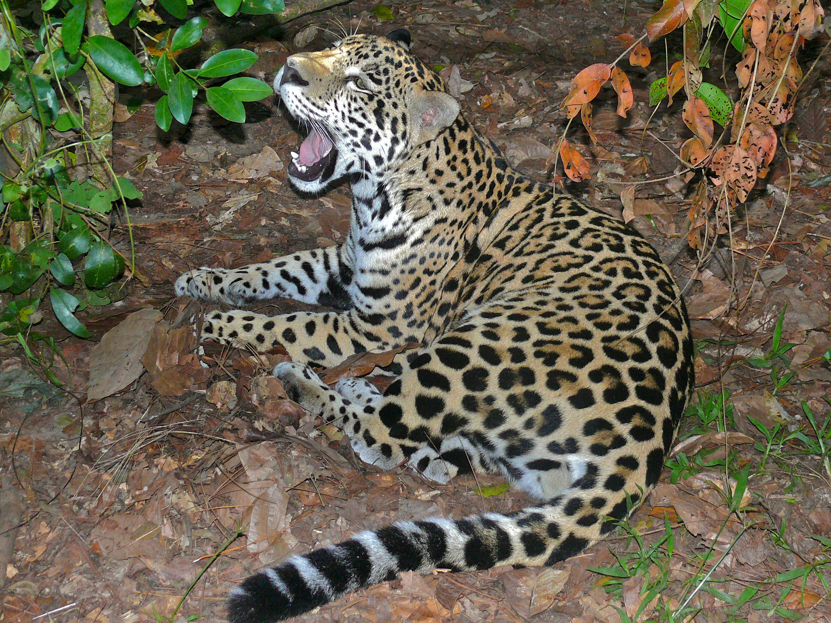 Belize Zoo, BELIZE